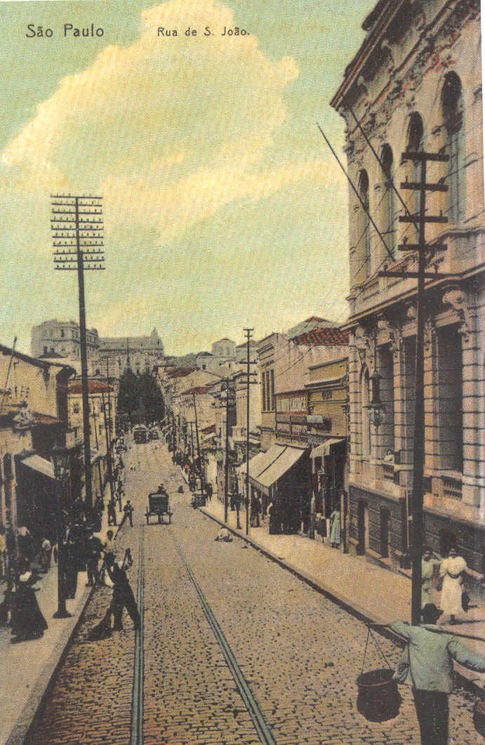 Vista da rua São João com Conservatório Dramático e Musical de São Paulo à direita, antes das obras de alargamento.